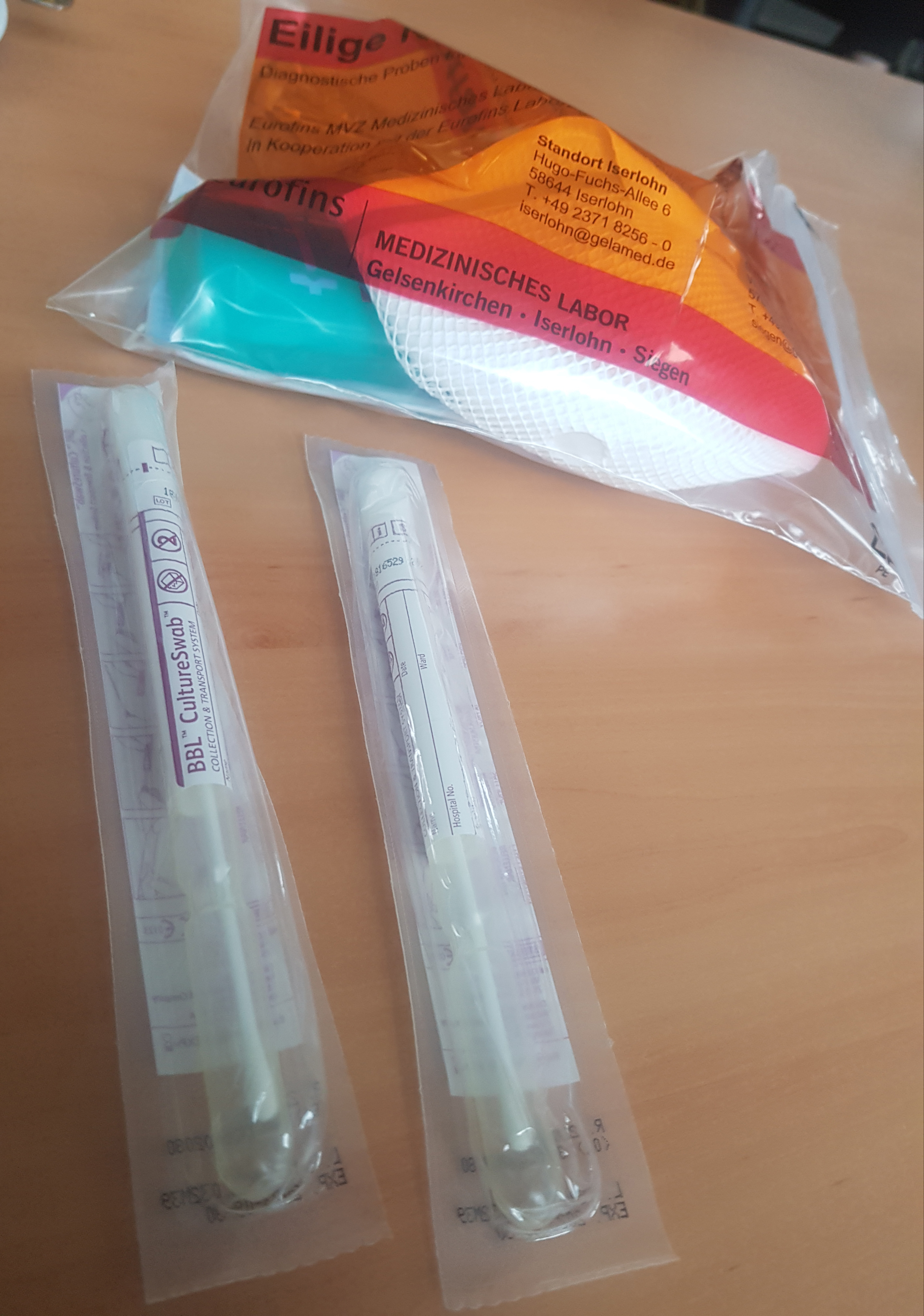 Corona Virus - Atemschutzmaske Test - Testset - Foto: Andreas Trojak. BBL CultureSwab.